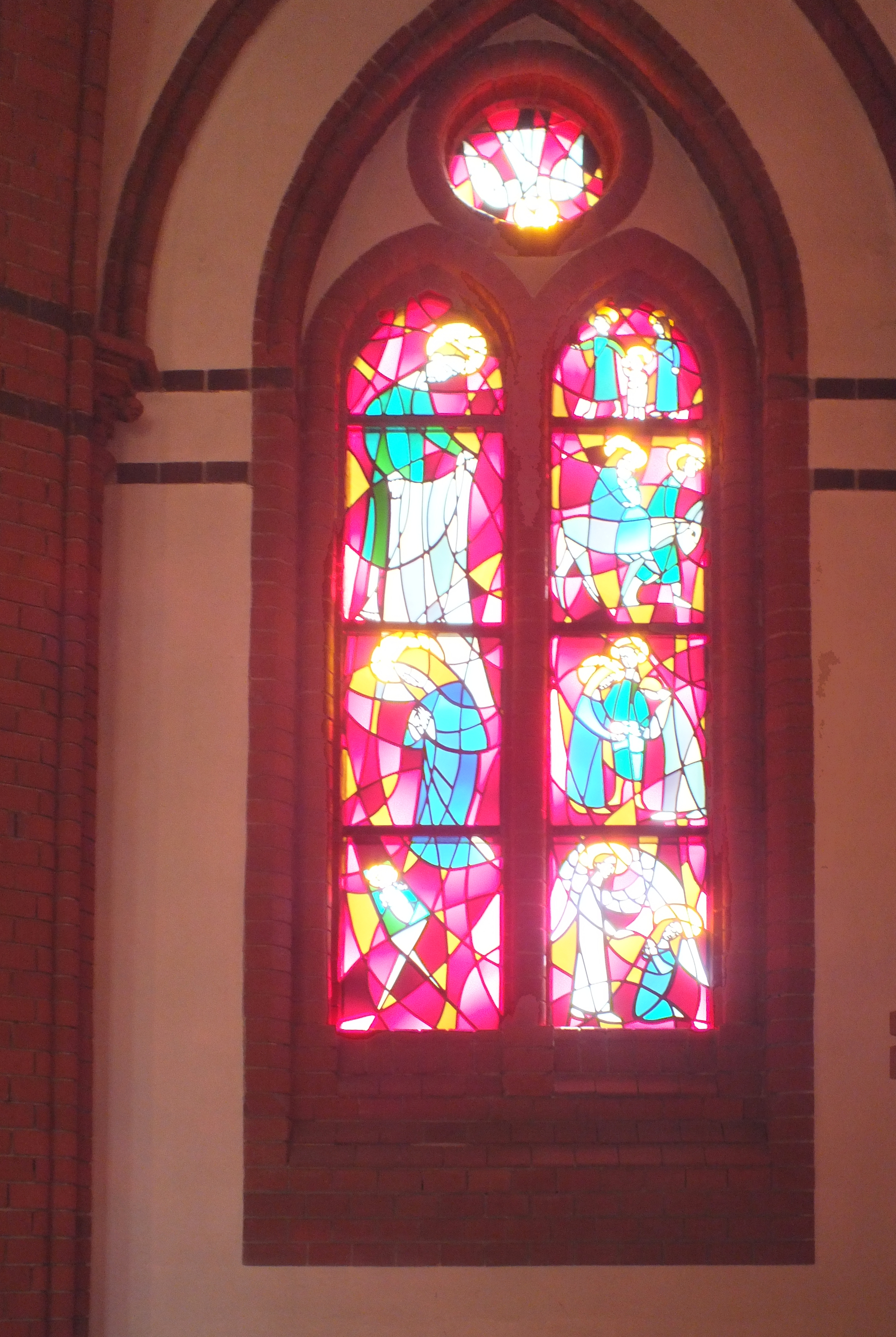 Berlin-Köpenick, Lindenstraße: Kathol. Kirche St. Josef, ein Altarfenster